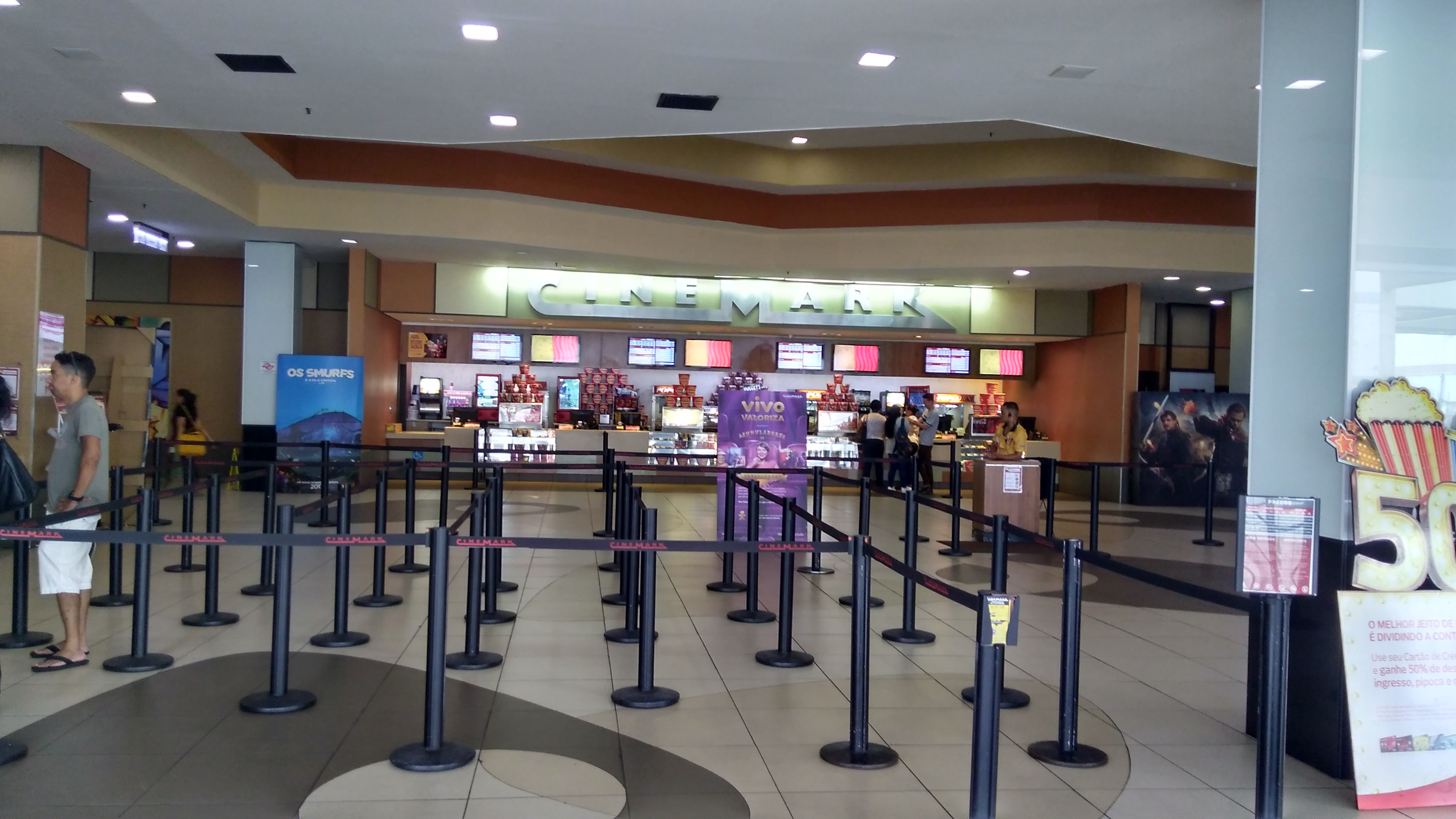 Vista do foyer do Cinemark SP Market de São Paulo, SP